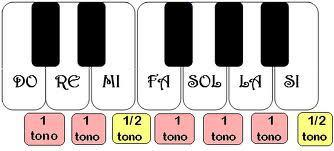 Bitarteak